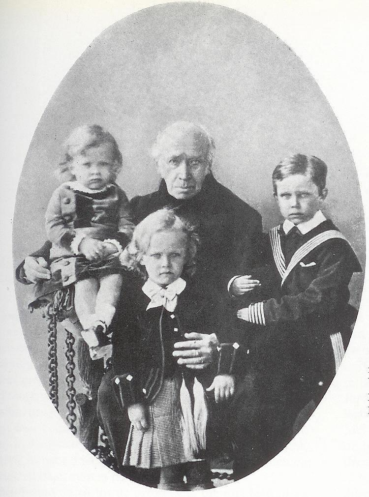 Foto van prins Frederik met drie kleinzoons. Foto omstreeks 1879. Auteursrecht verlopen. Afbeelding komt in meerdere publicaties voor. Deze versie gevonden op alwaar het zonder auteursrechten gekopieerd mag worden.